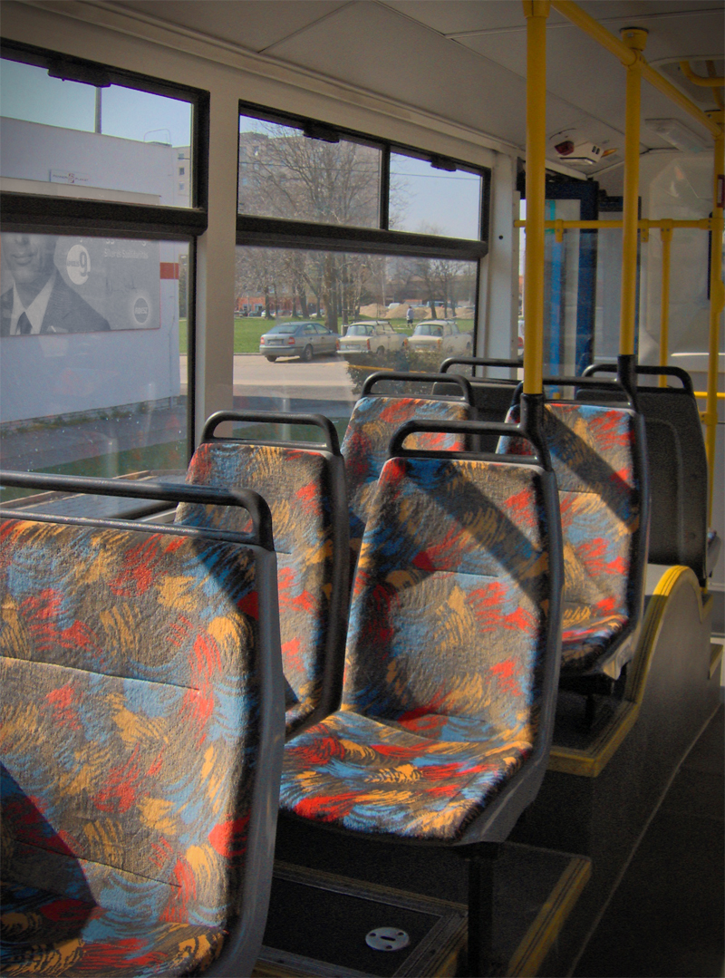 Ikarus 412 utastér (Alba Volán), Székesfehérvár